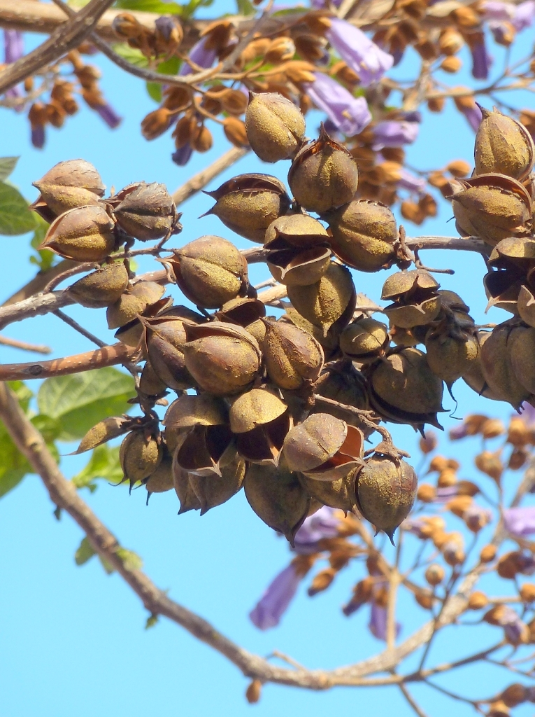 Paulownia tomentosa (Paulonia imperial) : Árbol en flor con las cápsulas del año anterior abiertas. Pza de Ródriguez Marín, Alcalá de Henares, Provincia de Madrid (España).